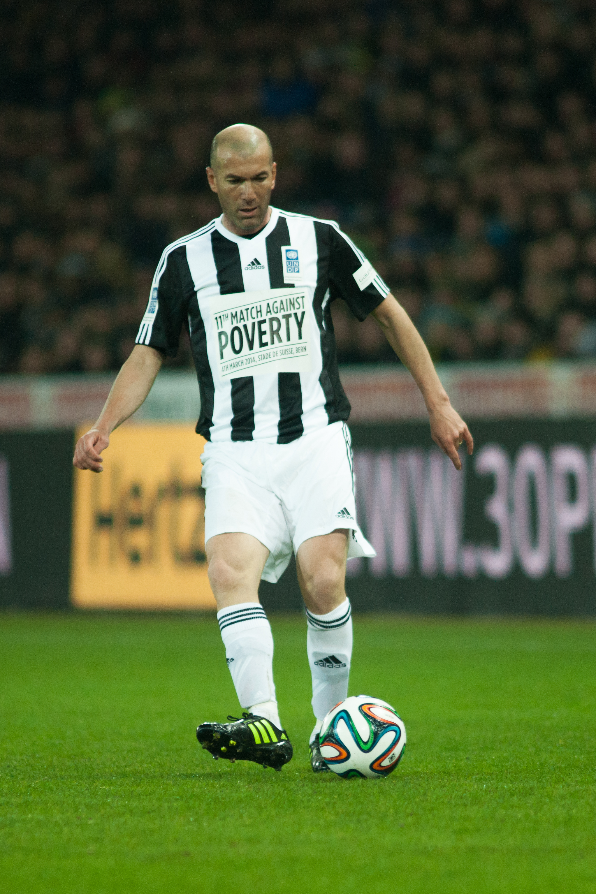 Football against poverty 2014 - Zidane (3)